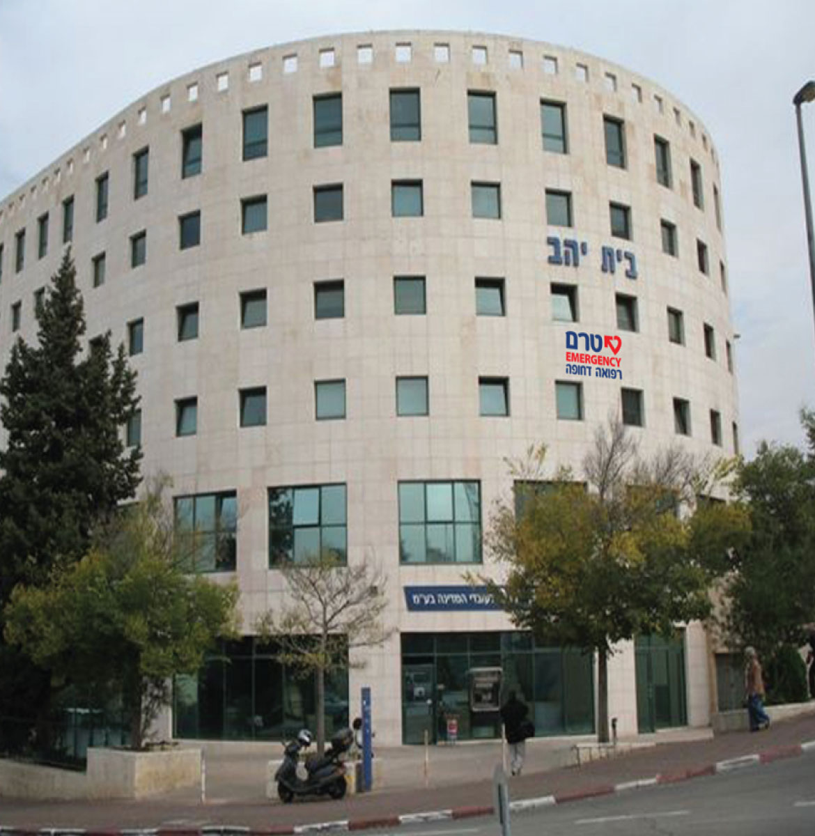 מבנה מרפאת טרם רוממה י-ם